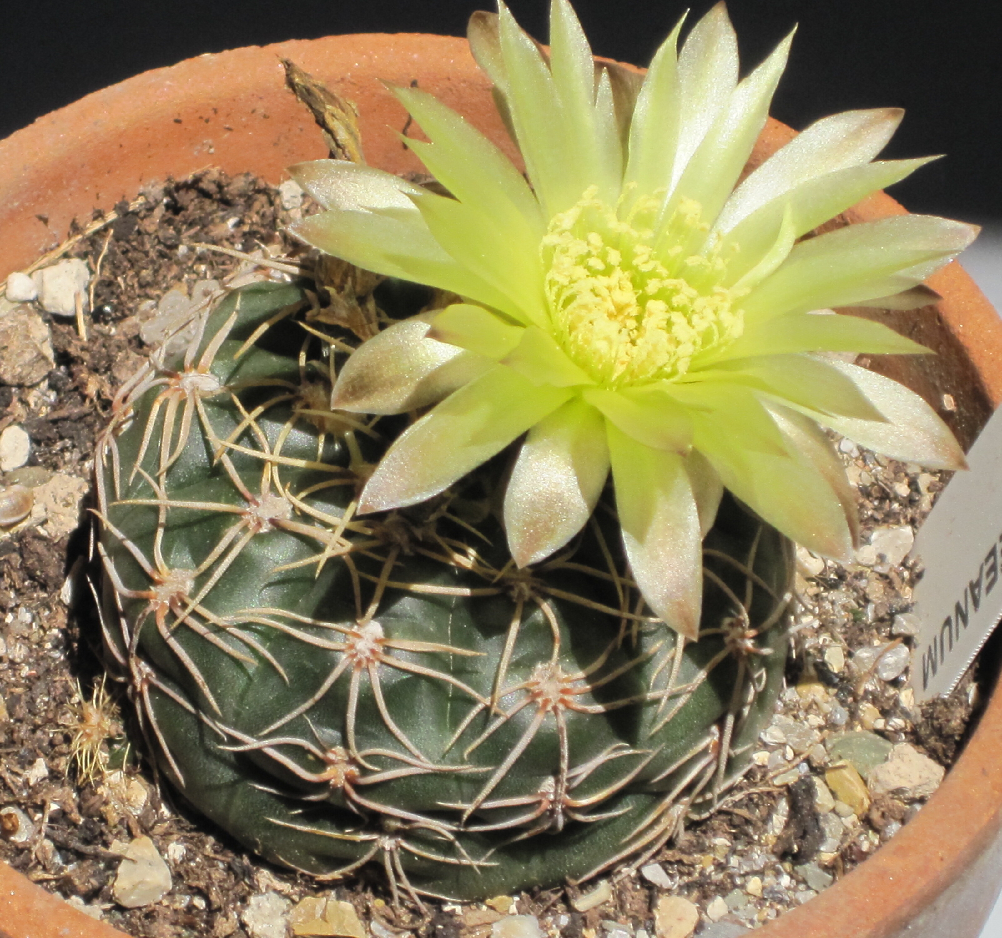 Un gymnocalycium leeanum in fiore